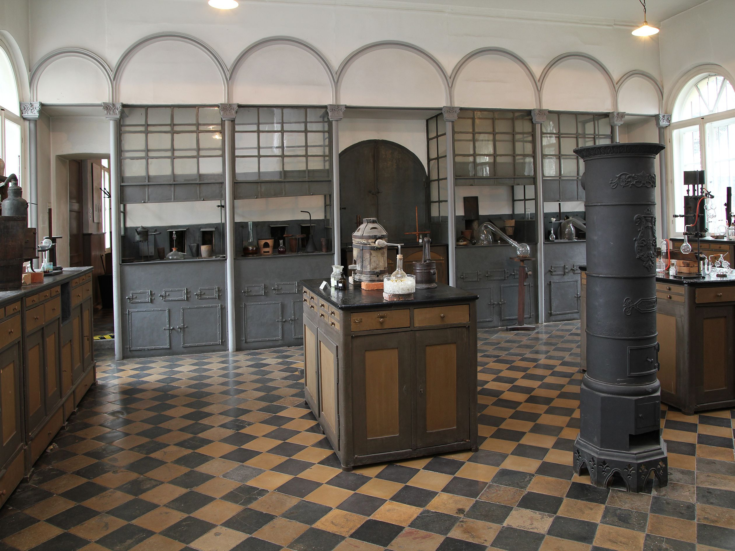 Liebigmuseum Gießen, Analytisches Labor